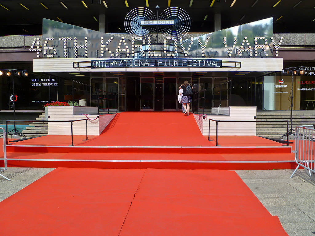 «Красная ковровая дорожка» 46-го фестиваля в Карловых Варах (2011)